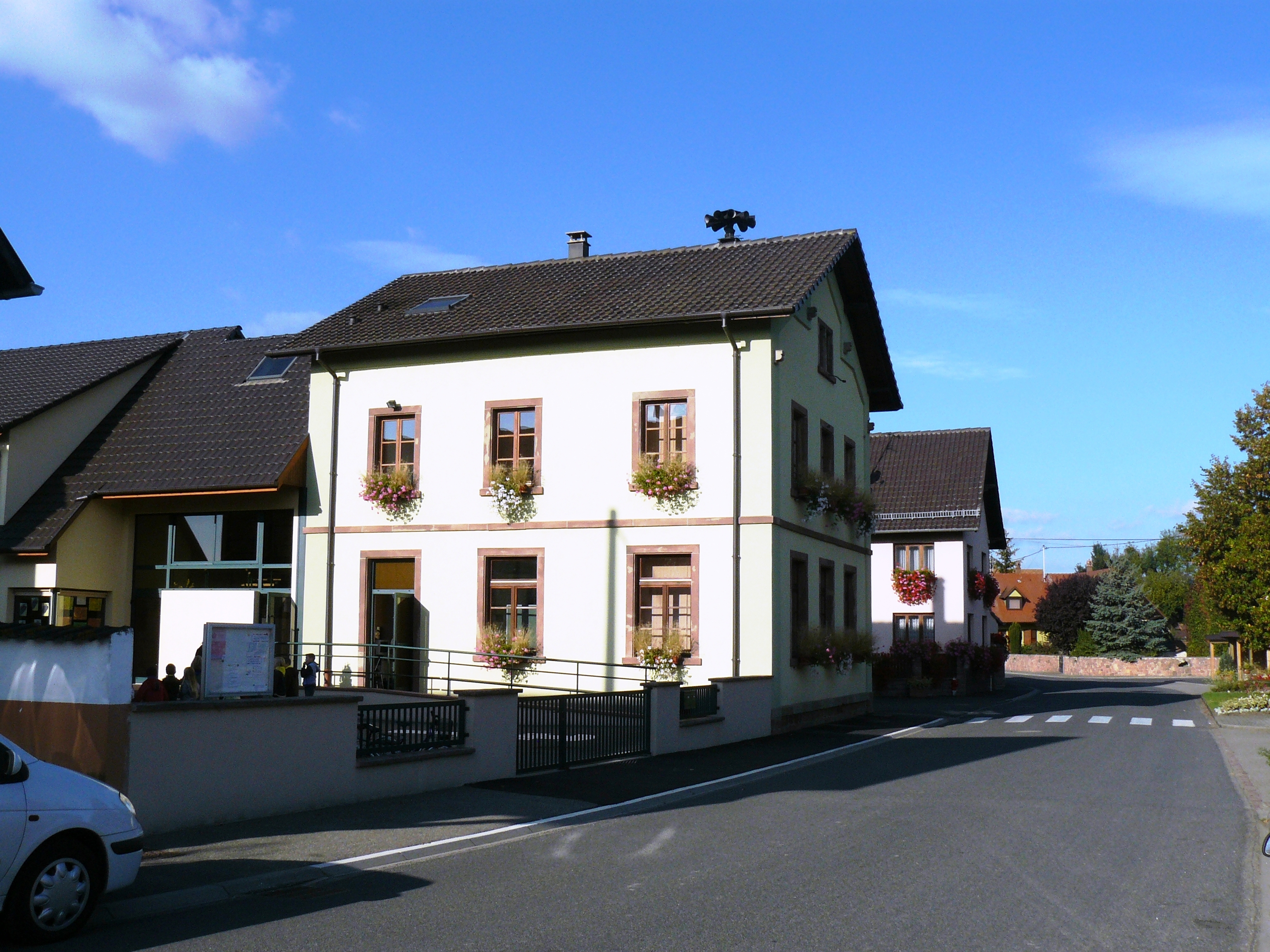 Mairie-École de Boesenbiesen